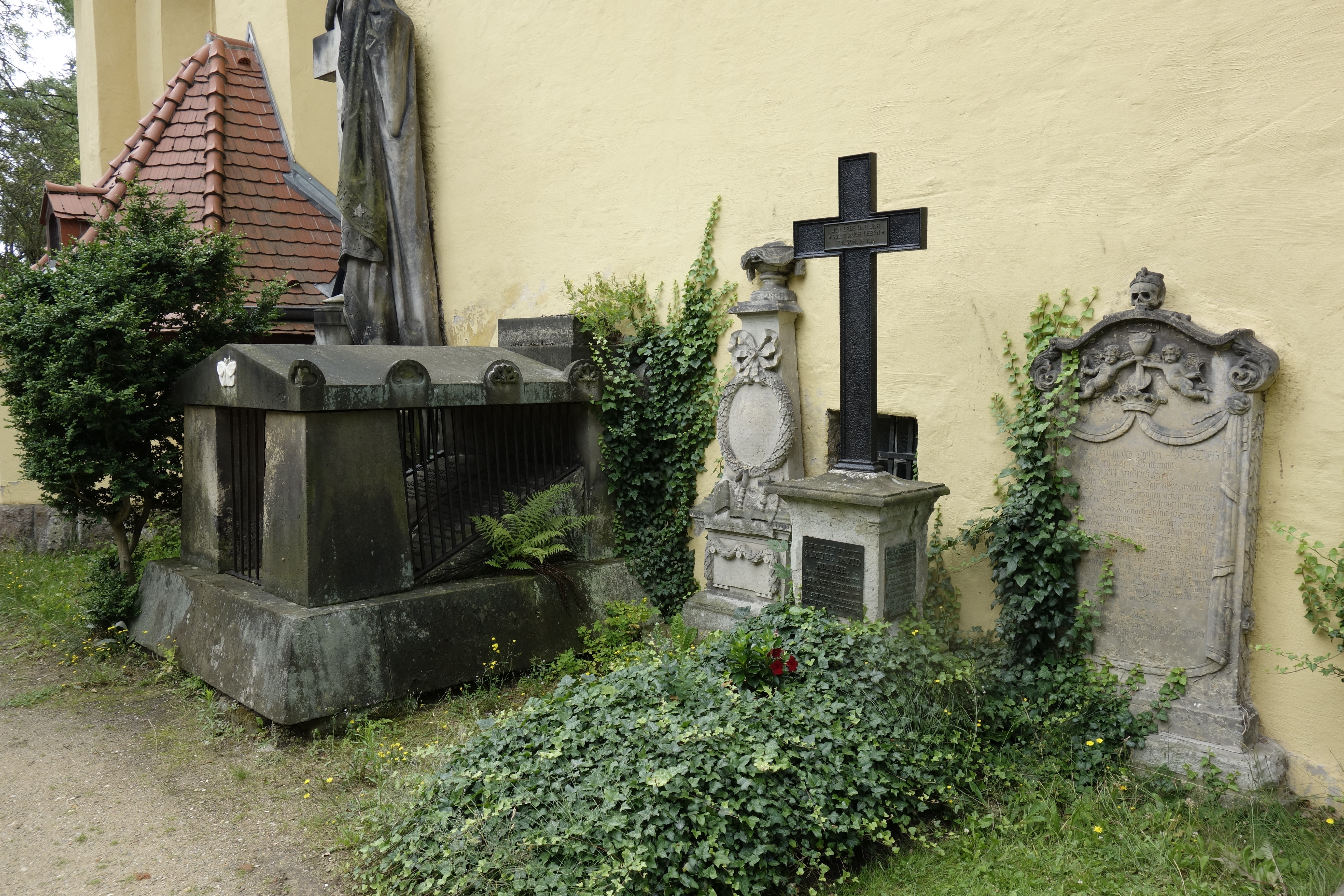 Kirche Lausa Juli 2017 (11)